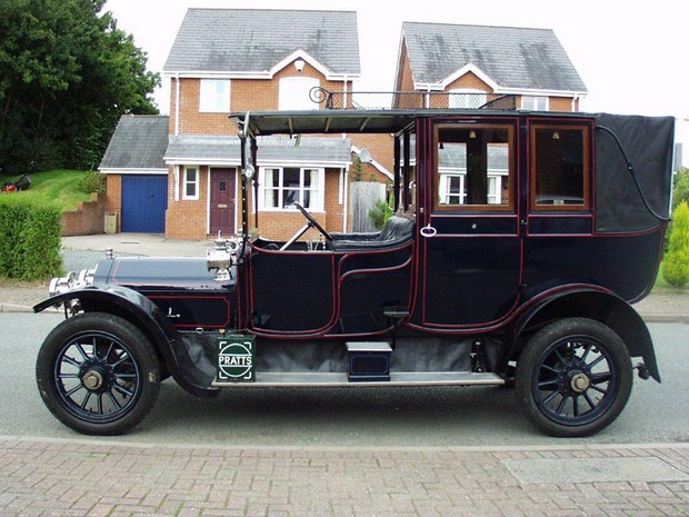 1912 Wolseley 16-20hp Landaulette